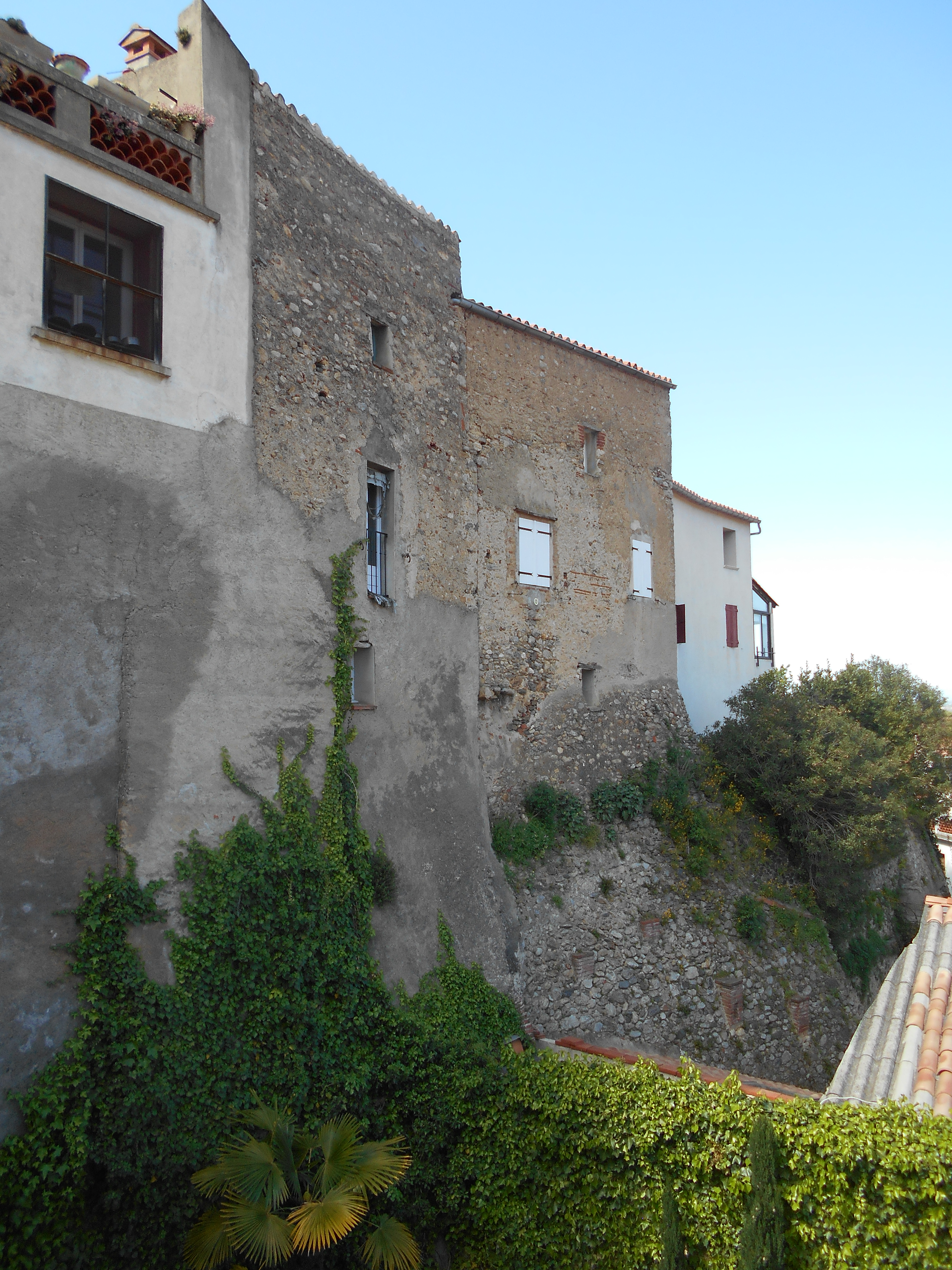 Muralles de la Roca d'Albera